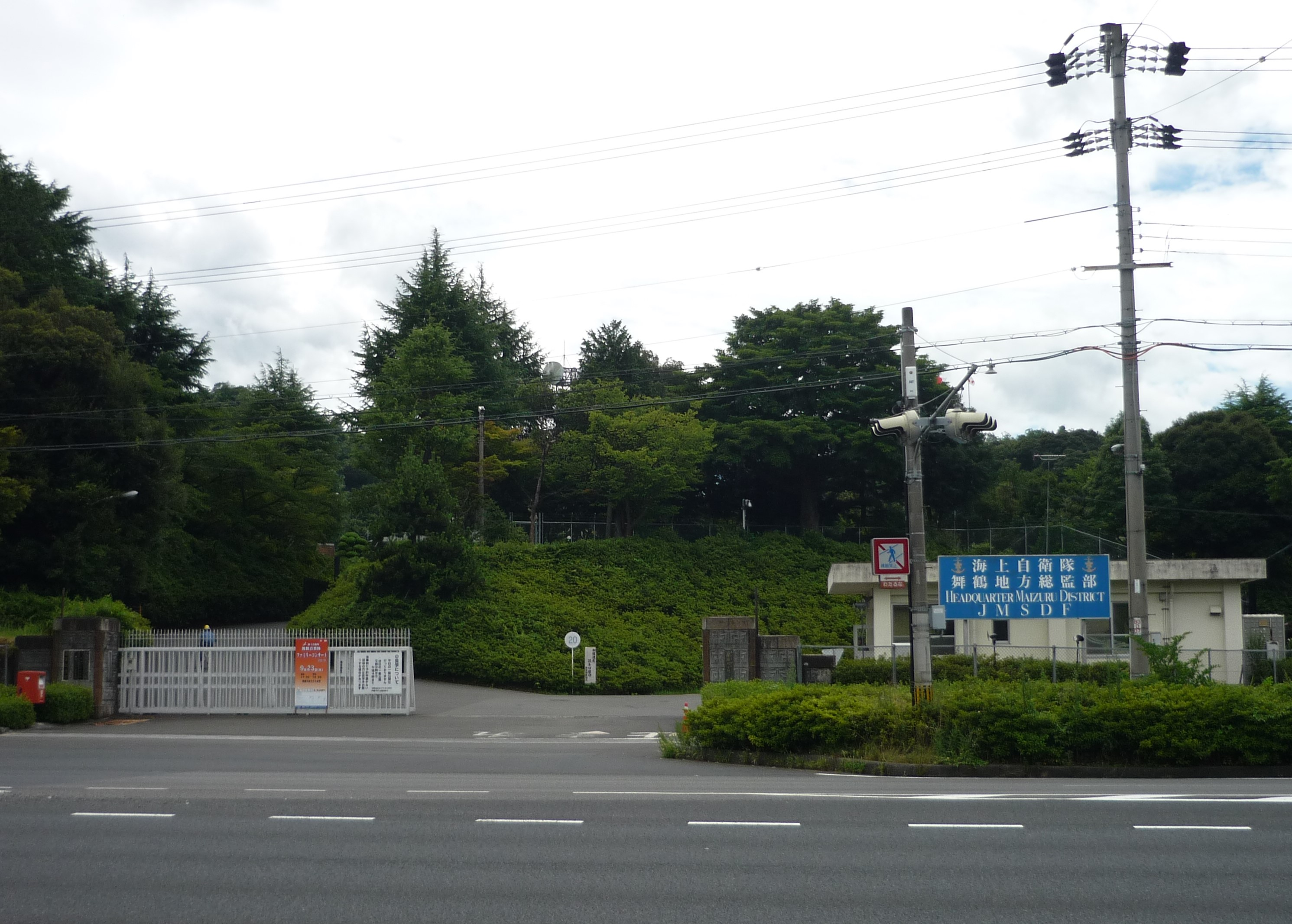 海上自衛隊舞鶴地方総監部の入口